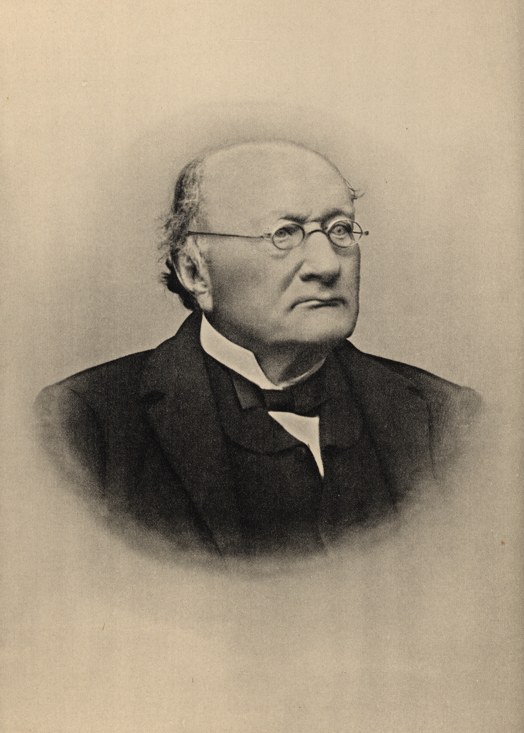 Format: Litografi (etter fotografi) Utgivelsesår / Published: 1913 (Vore Høvdinger 29) Utgiver / Publisher: F. Bruns Bokhandels Forlag, Trondhjem Store Norske Leksikon: Jan Adolph Budde (1811 - 1906) Salmonsens konversationsleksikon: Jan Adolph Budde (1811 - 1906) Eier / Owner Institution: Trondheim byarkiv, The Municipal Archives of Trondheim Arkivreferanse / Archive reference: Ila skole, Va - F9415 Fra Salmonsens konversationsleksikon: Budde, Jan Adolph, norsk Agronom (1811-1906), blev ved sin teoretisk og praktisk ansporende Lærervirksomhed en af det norske Landbrugs ypperste Foregangsmænd. Han bevirkede bl. a. en fuldstændig Omlægning af det frugtbare Jæderens Landbrug og var en af de første til at indføre national Skovplantning i større Stil i denne Landsdel, tilførte i det hele den norske Bondestand Impulser af Bet. for Landets økonomiske Udvikling. K. V. H.